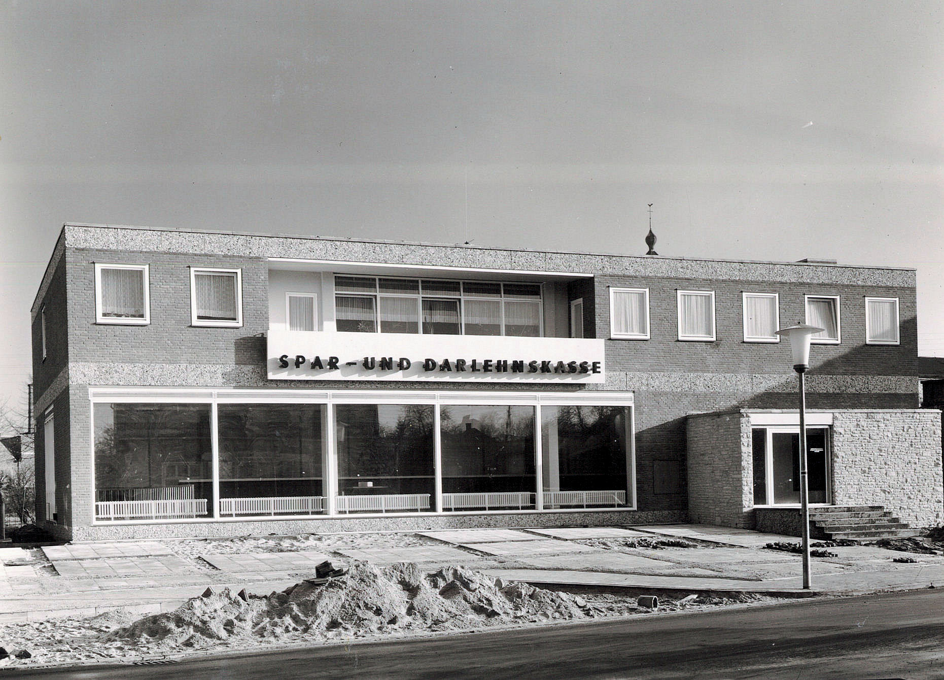 Bezug Hauptstelle Volksbank Gescher 1962